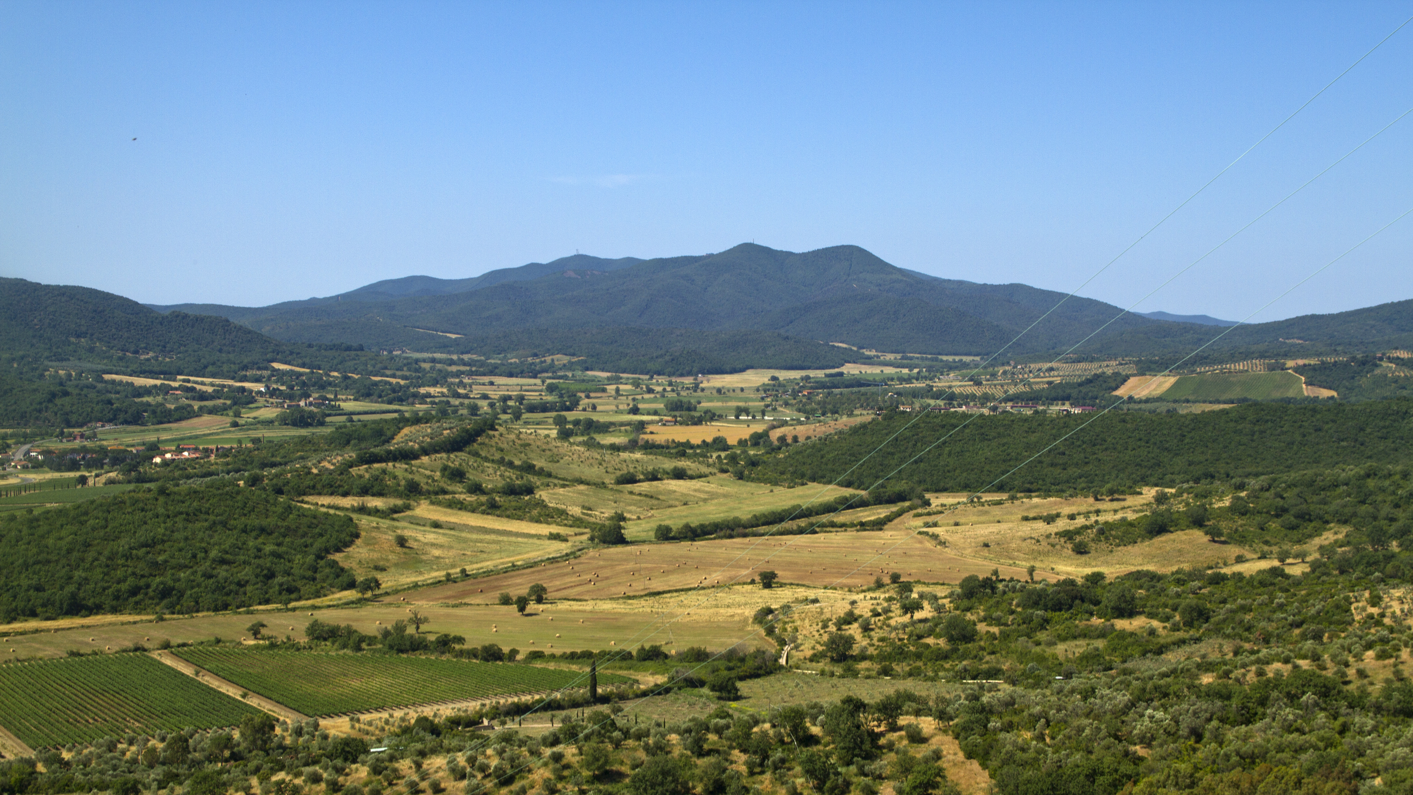 58023 Giuncarico, Province of Grosseto, Italy